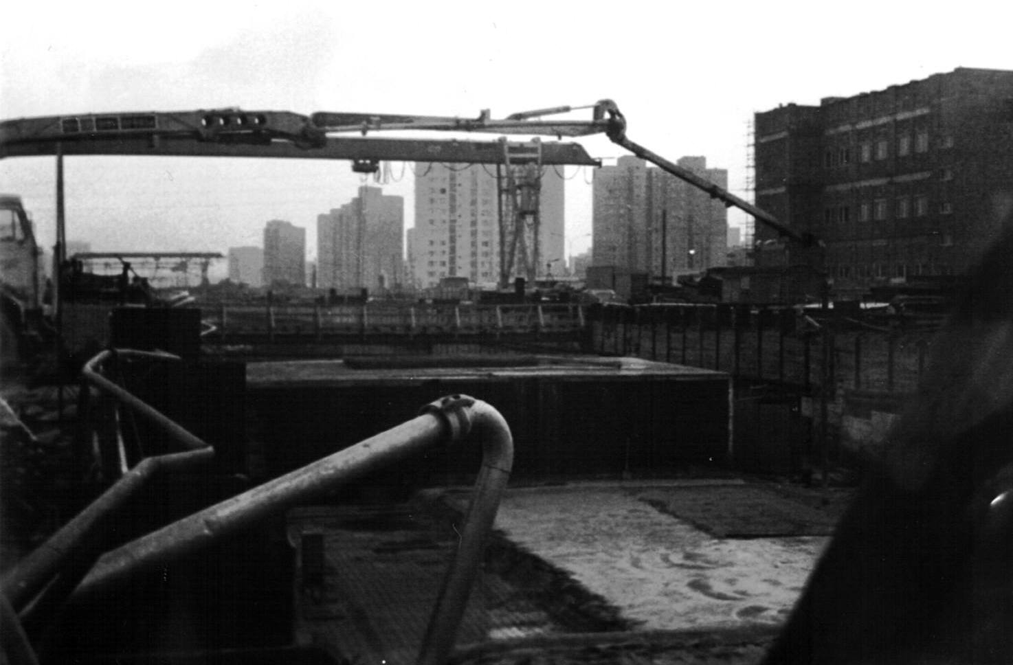 Budowa stacji metra A4 Stokłosy, listopad 1986.